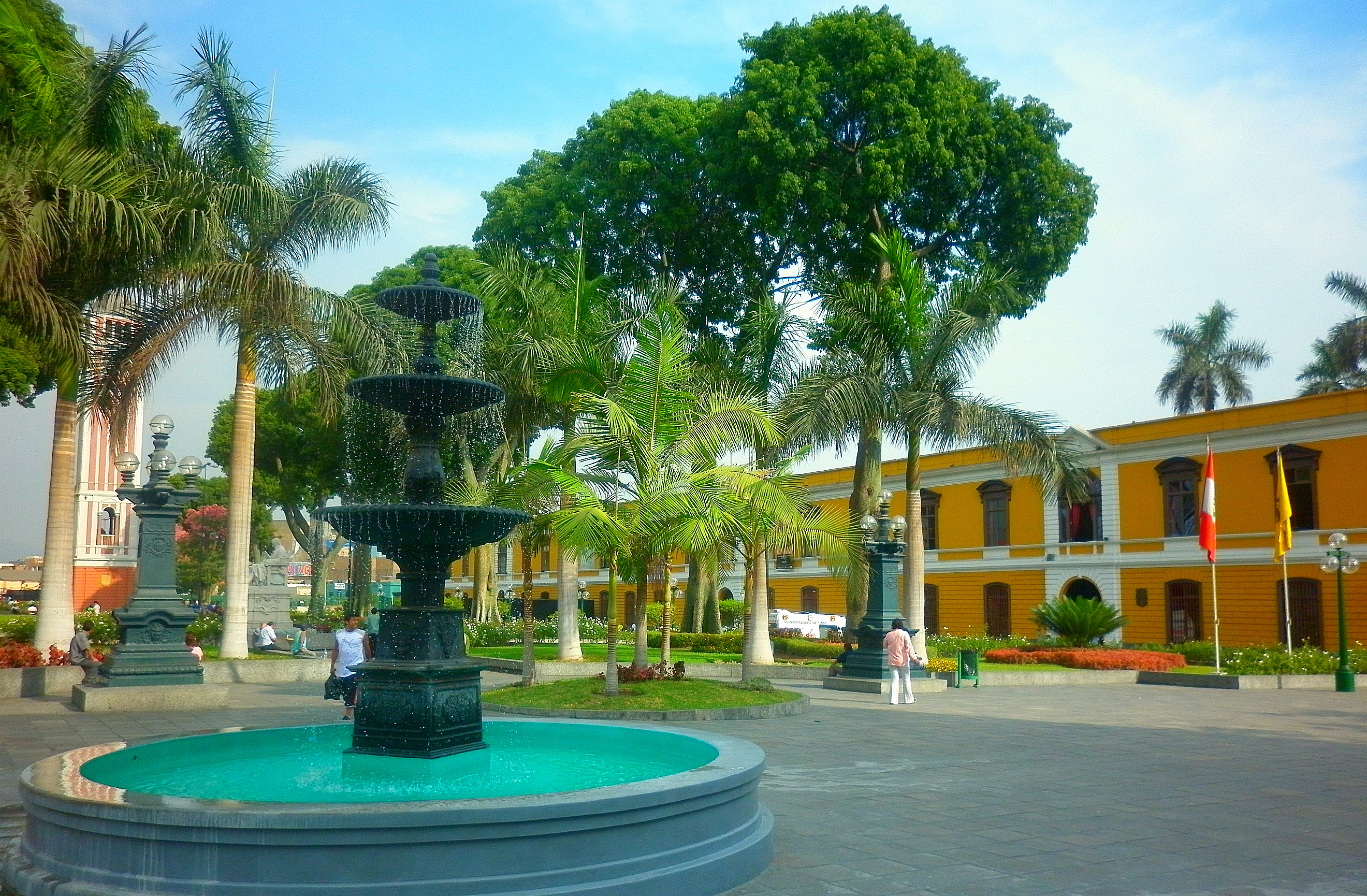 Casona de la Universidad Nacional Mayor de San Marcos y Parque Universitario, Lima, Peru.